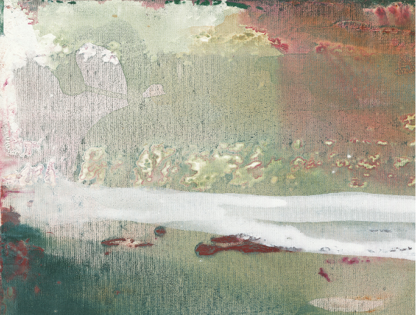 Eva Maria Enders, Dao I, 2008 Mischtechnik auf Leinwand, 40 x 30 cm.